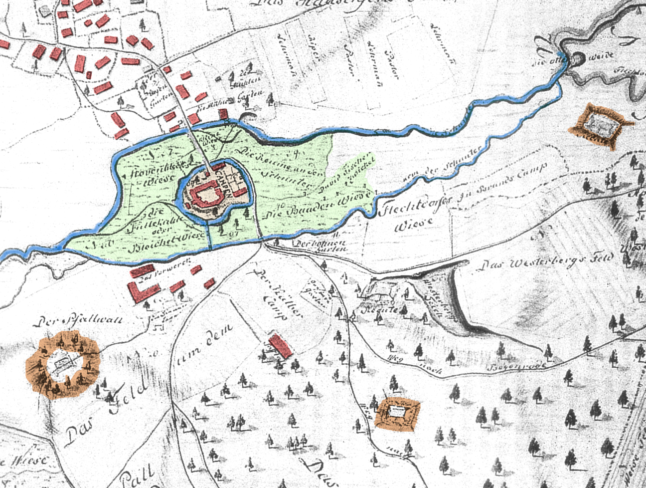 Lagekarte von Burg Campen und Flechdorf, nachkoloriert, braun eingezeichnet der Pallwall sowie zwei weitere frühere Belagerungsschanzen